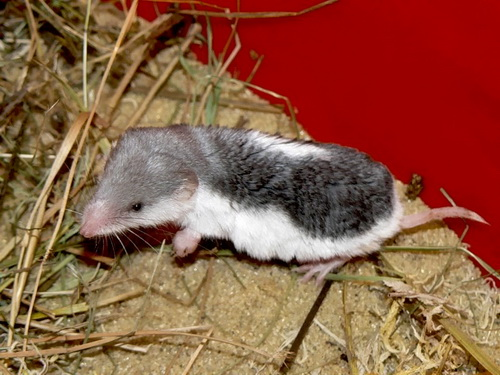 Пегий путорак (Diplomesodon pulchellum), Московский зоопарк (Moscow zoo)